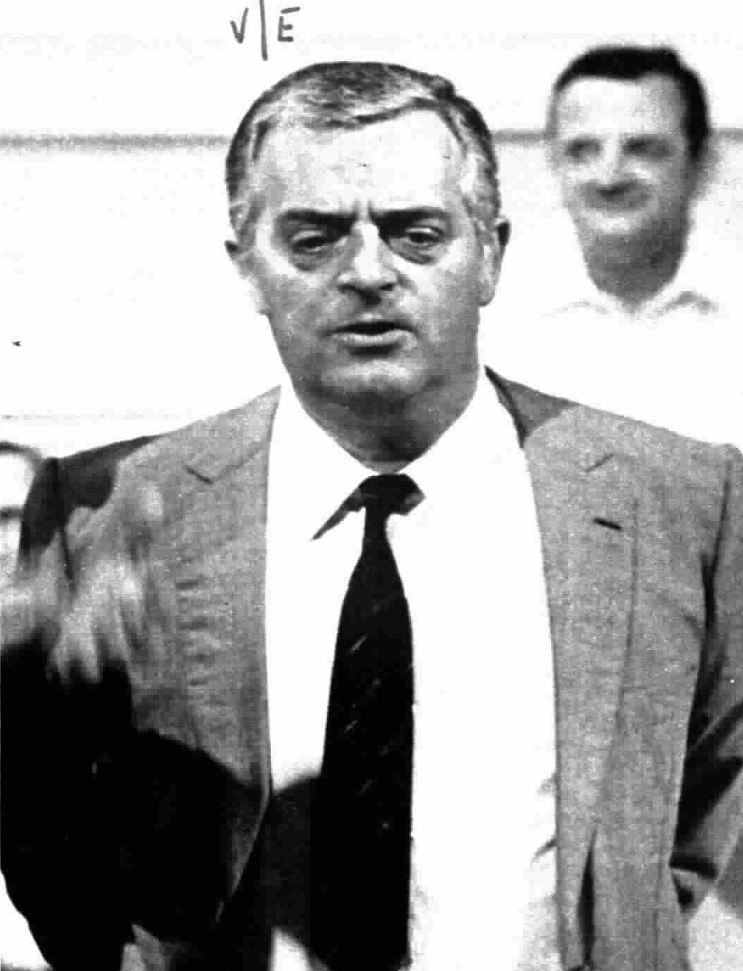 l'attore Enzo Liberti